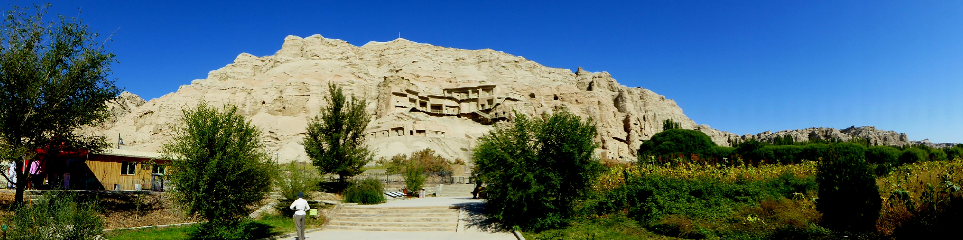 Kizil Caves Kuqa Xinjiang China 新疆 库车 克孜尔千佛洞